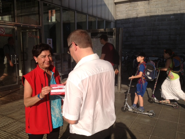 1160 Nurten Yilmaz U3 Ottakring_2013-06-18_07.30h